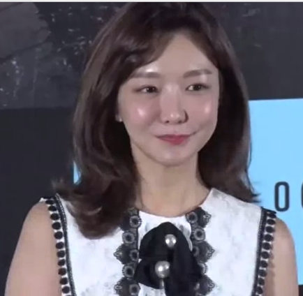 Shin So yul actriz surcoreana